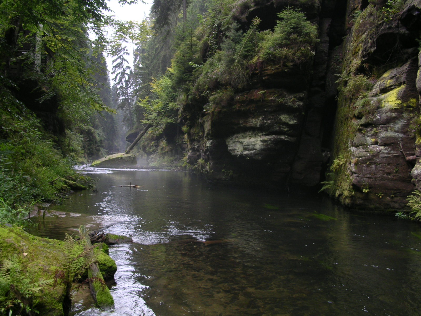 Soutěsky na říčce Kamenici u Hřenska.